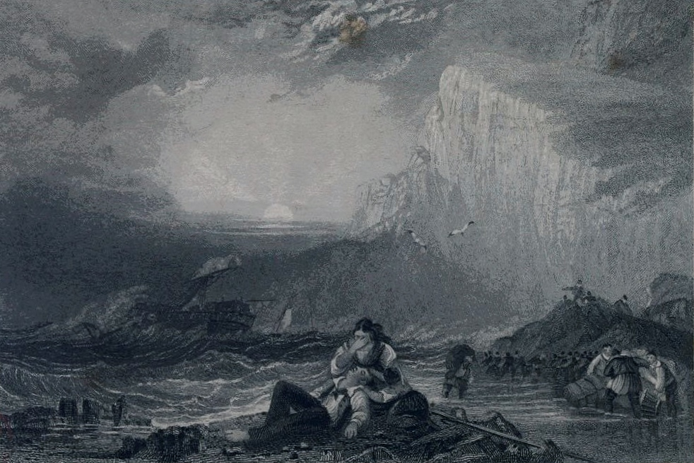 Gravure publiée dans le livre d'Amable Tastu "Soirées littéraires de Paris" et illustrant la nouvelle d'Édouard Corbière Naufrage à Plouguerneau, dans le Finistère.